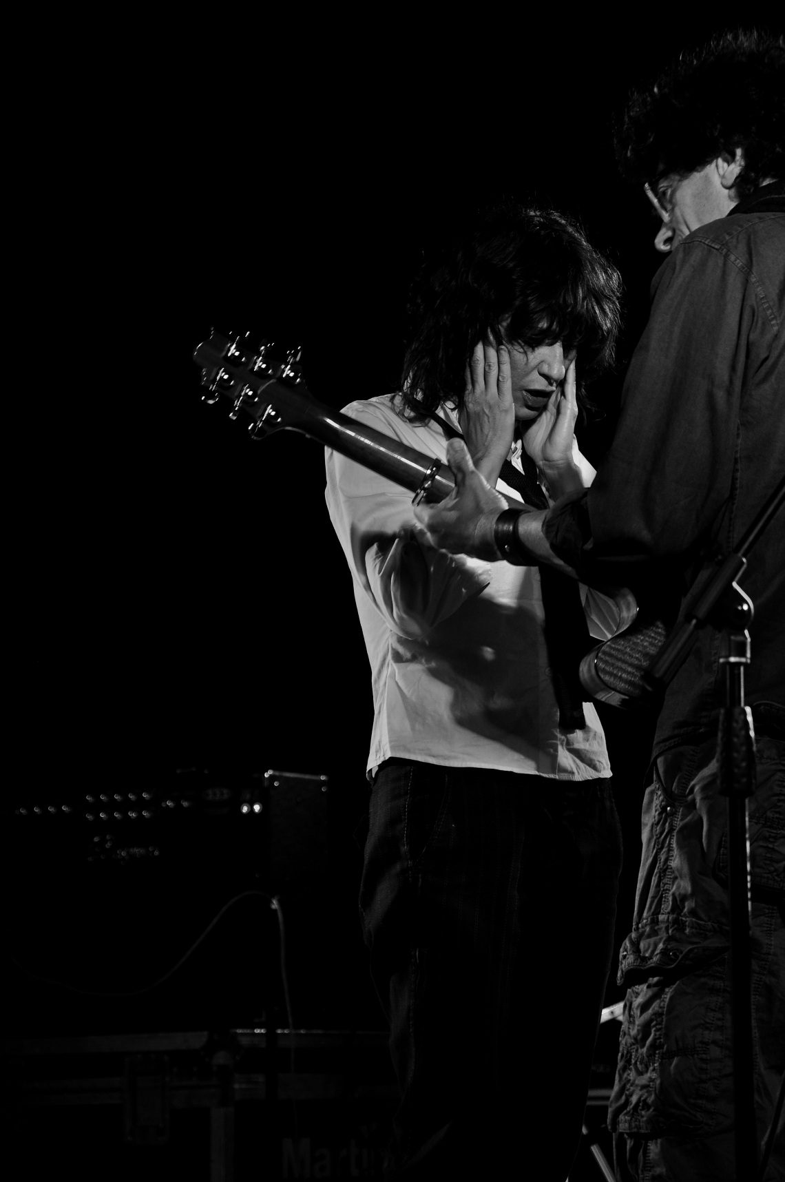 Angela Baraldi e Massimo Zamboni in "Solo una terapia: dai CCCP all'estinzione", Santa Lucia, Nuoro (16 giugno 2012).